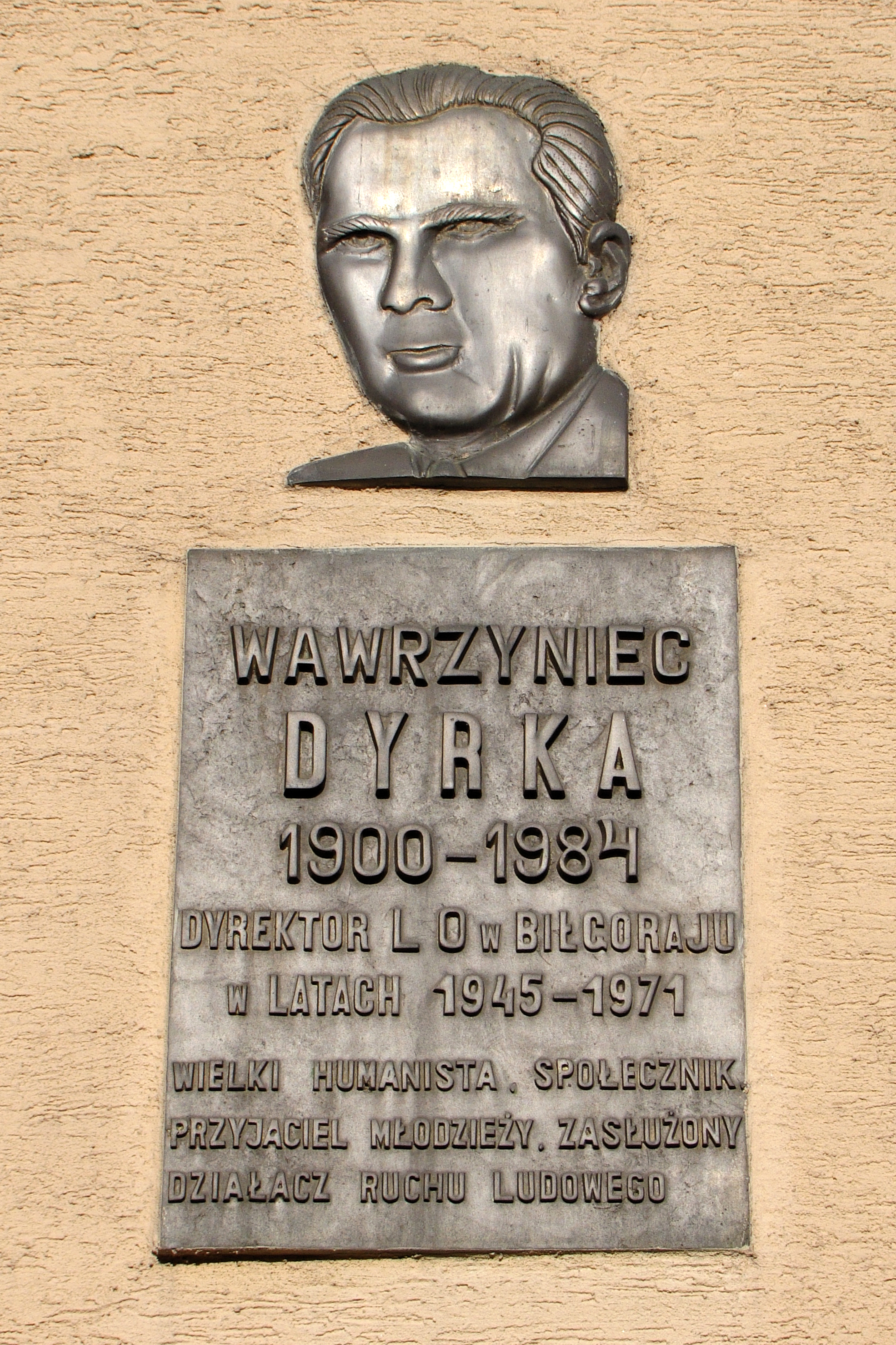 Biłgoraj - Gimnazjum nr 1 - tabliczka na ścianie ku pamięci Wawrzyńca Dyrki